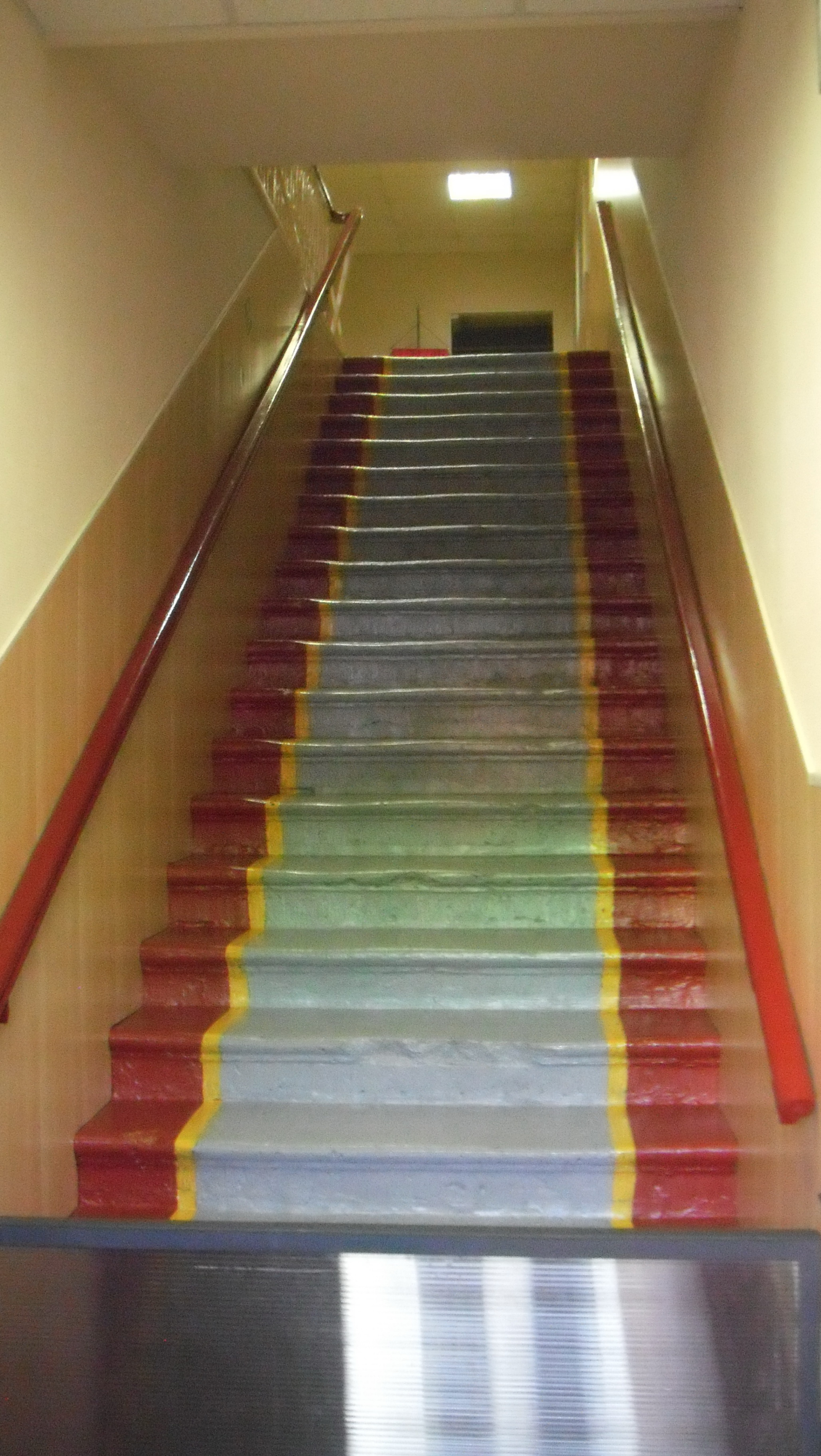 Сестрорецк ул.Володарского дом 1 (купца Калачёва П.Е.). Лестница.